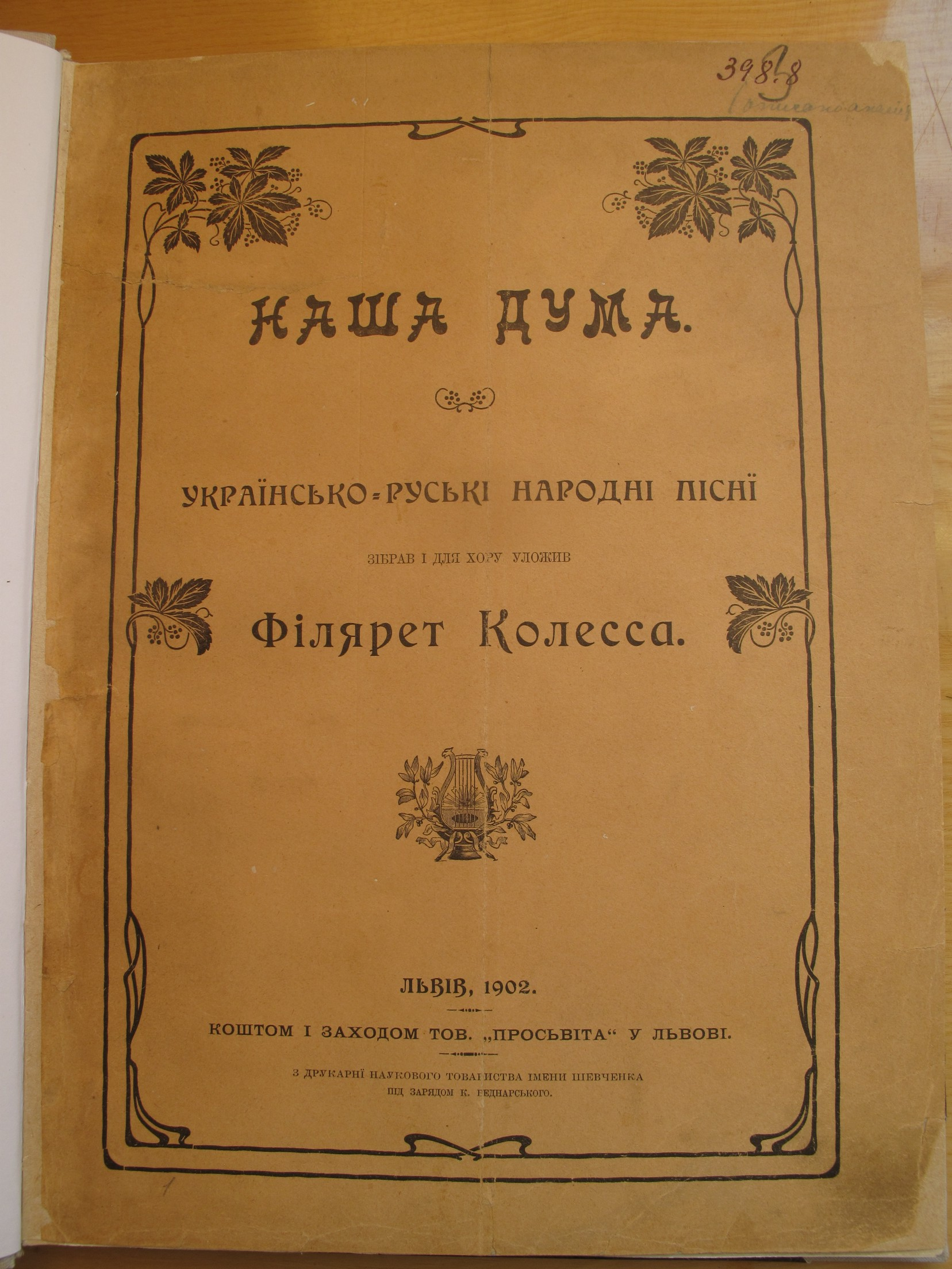 Ф. Колесса, Наша дума, 1902, Львів